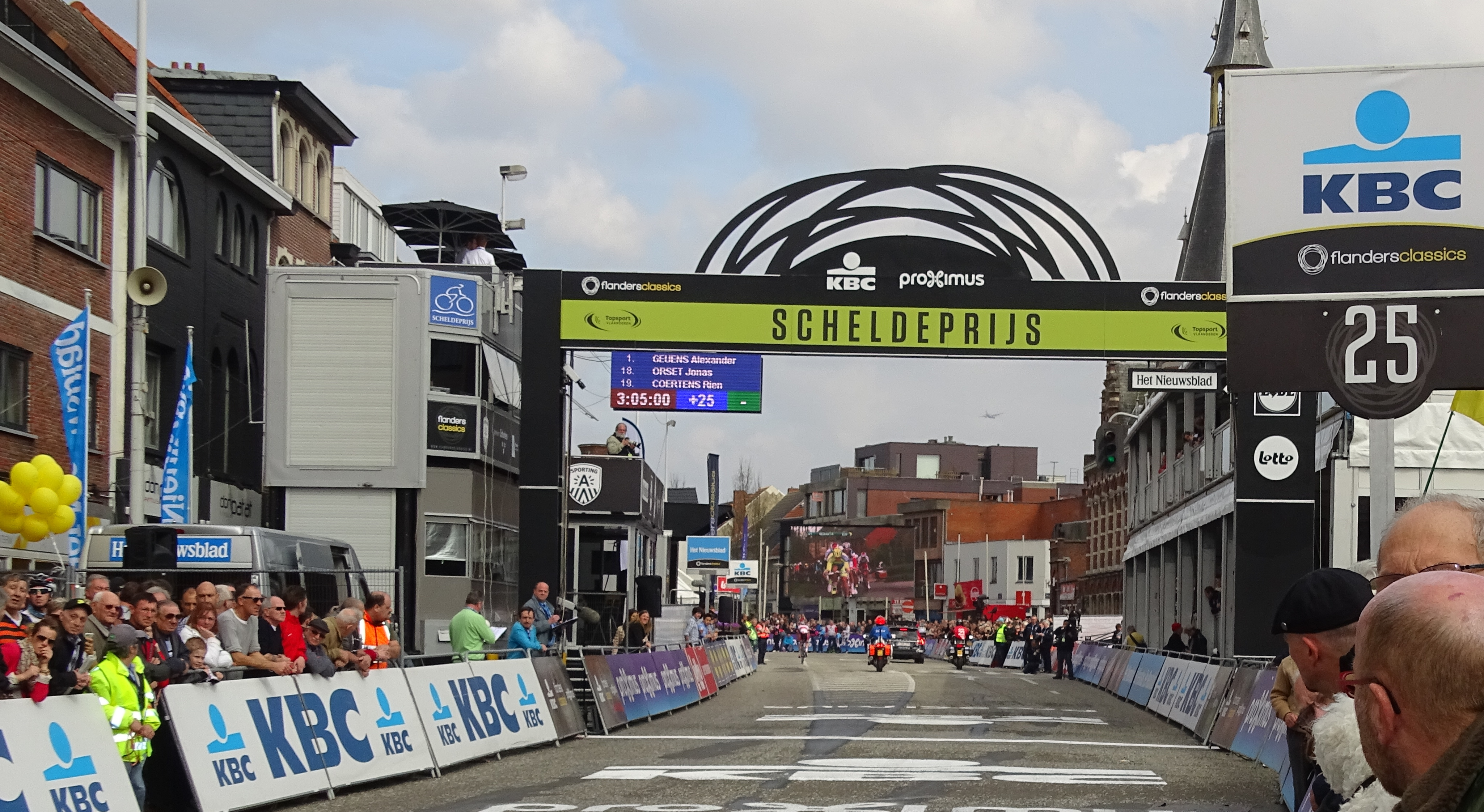 Reportage réalisé le mercredi 8 avril à l'occasion de l'arrivée du Grand Prix de l'Escaut 2015 à Schoten, Belgique.